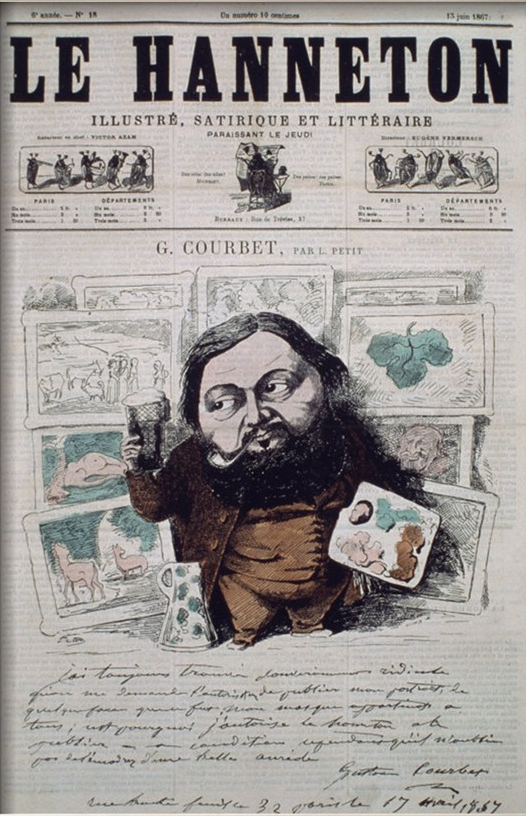 Gustave Courbet, caricature par Léonce Petit publiée dans l'hebdomadaire Le Hanneton du 13 juin 1867. Probable première évocation graphique et publique, mais sybilline, de son tableau L'origine du monde (1866), représenté dans un cadre par une feuille de vigne, à droite de son visage.